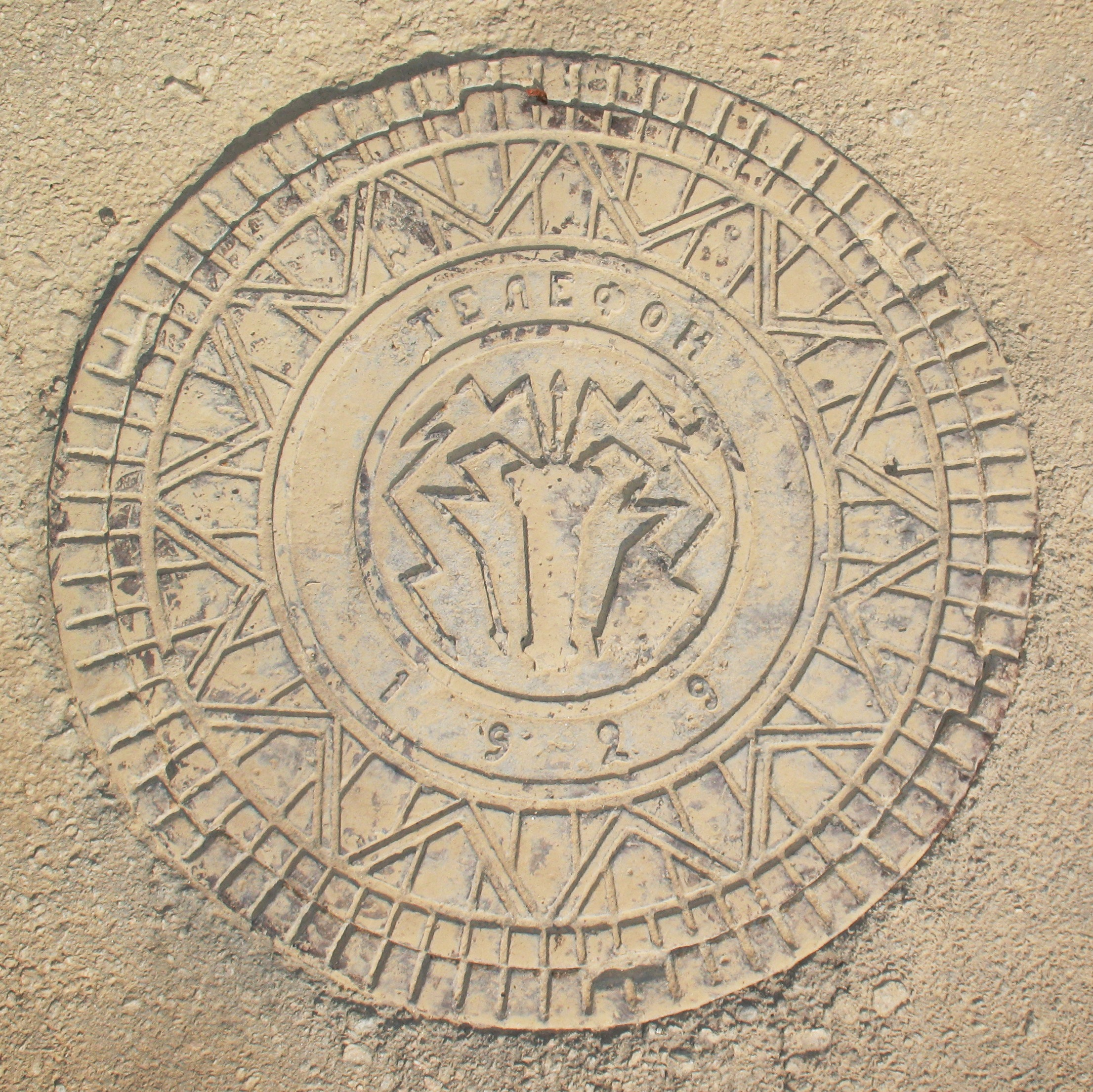 Народный комиссариат почт и телеграфа СССР (НКПТ). Стальная крышка телефонного люка (линия прокладывалась в конце 1920-х; до того, как наркомат был переименован в НКС) с эмблемой наркомата в виде электрического разъёма и изолятора с молниями, вписанной в двенадцатитиконечную звезду. Харьков. Московский проспект.